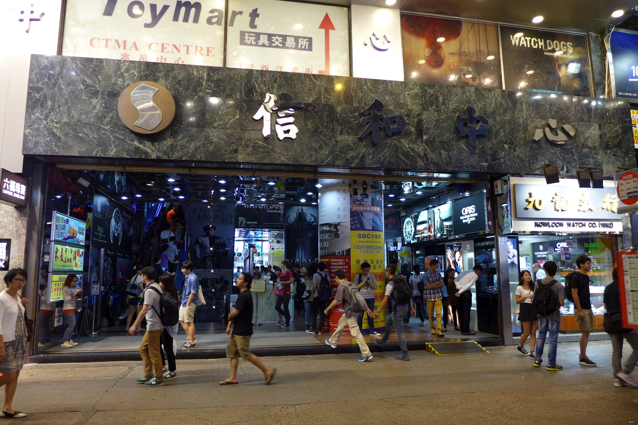 Sino Centre Entrance